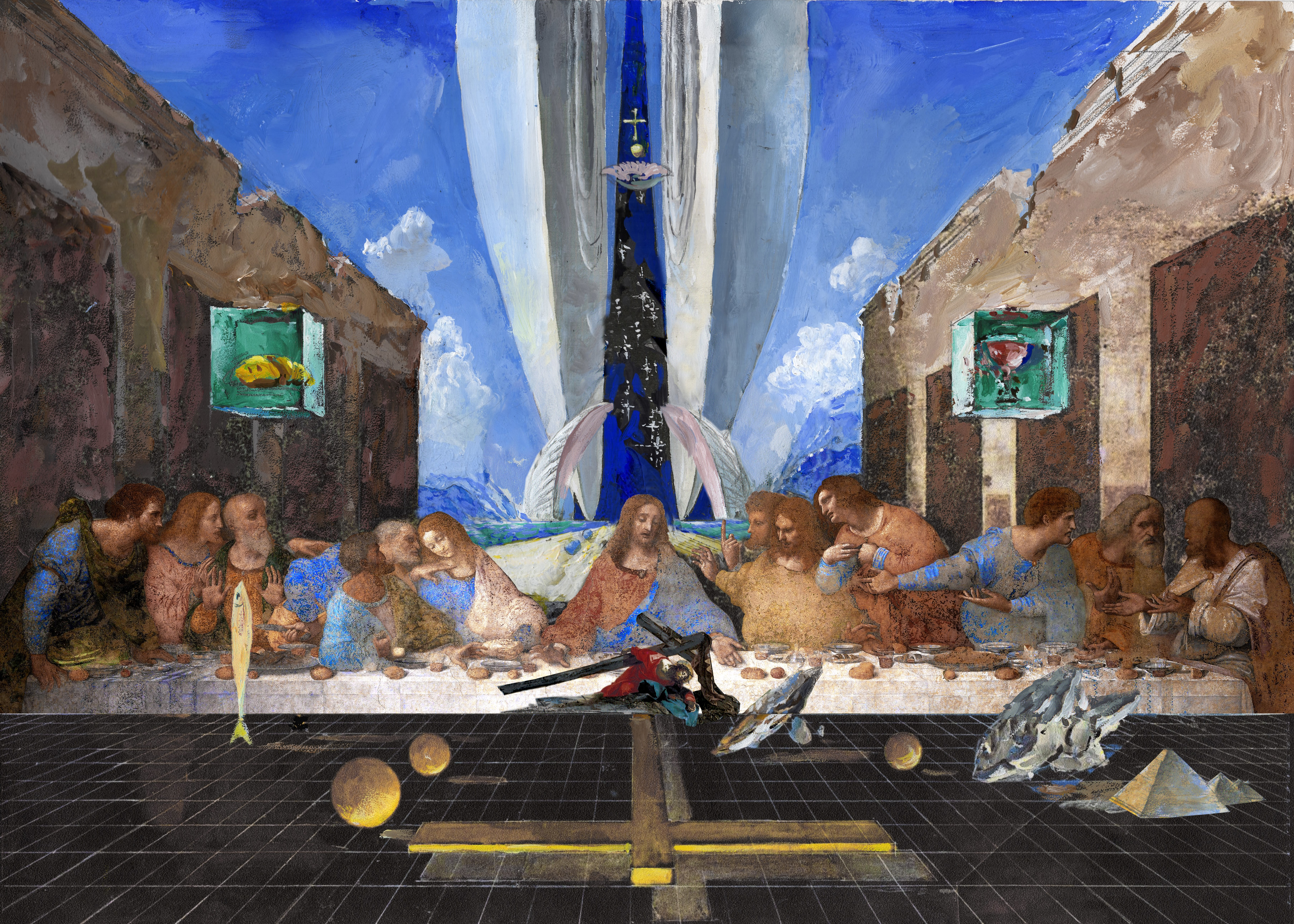 Орловский В. Ф. «Тайная вечеря Леонардо да Винчи в пространстве космопластицизма», 2016 г. Холст, смешанная техника, 100х140см.